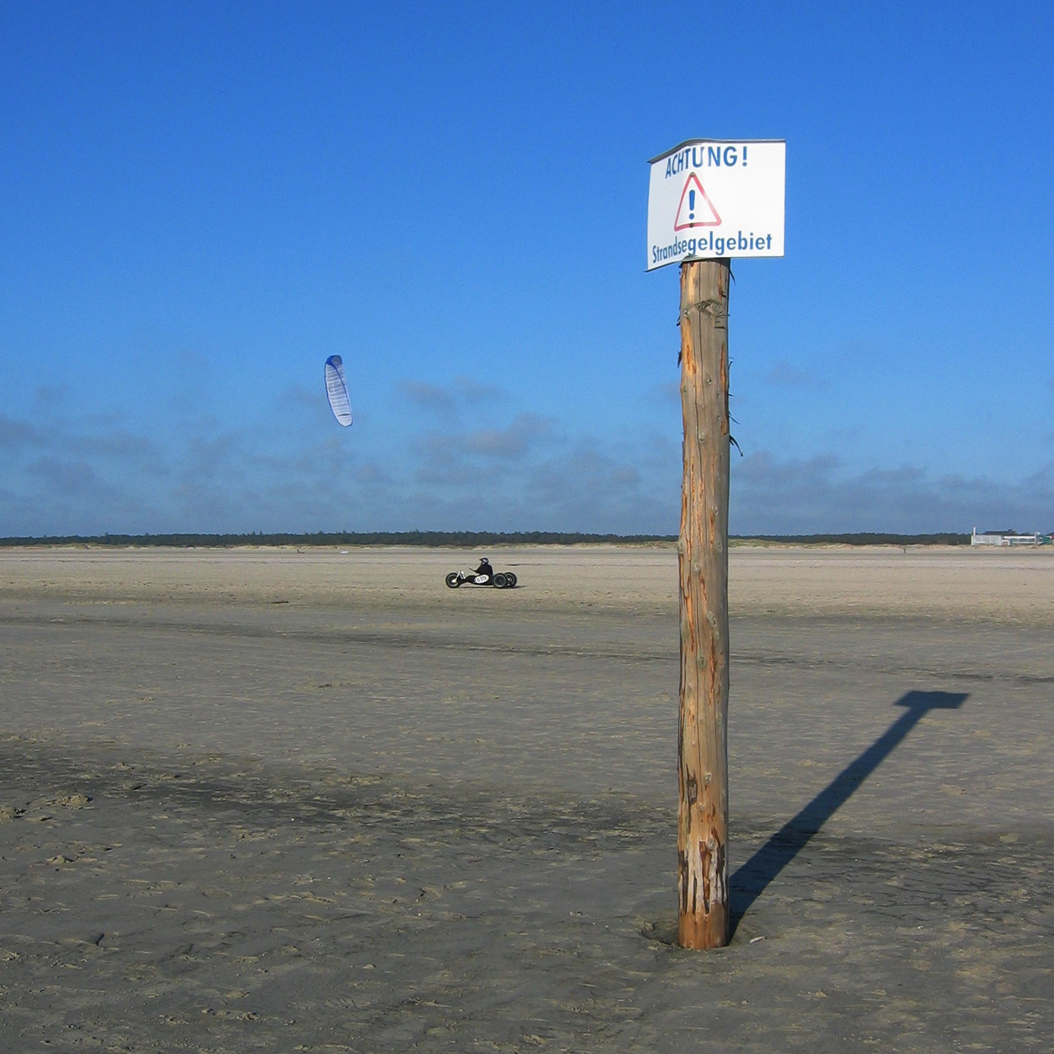 Kitebuggyfahrer und Hinweisschild „Achtung Strandsegelgebiet“ am Strand von Sankt Peter-Ording, Bad